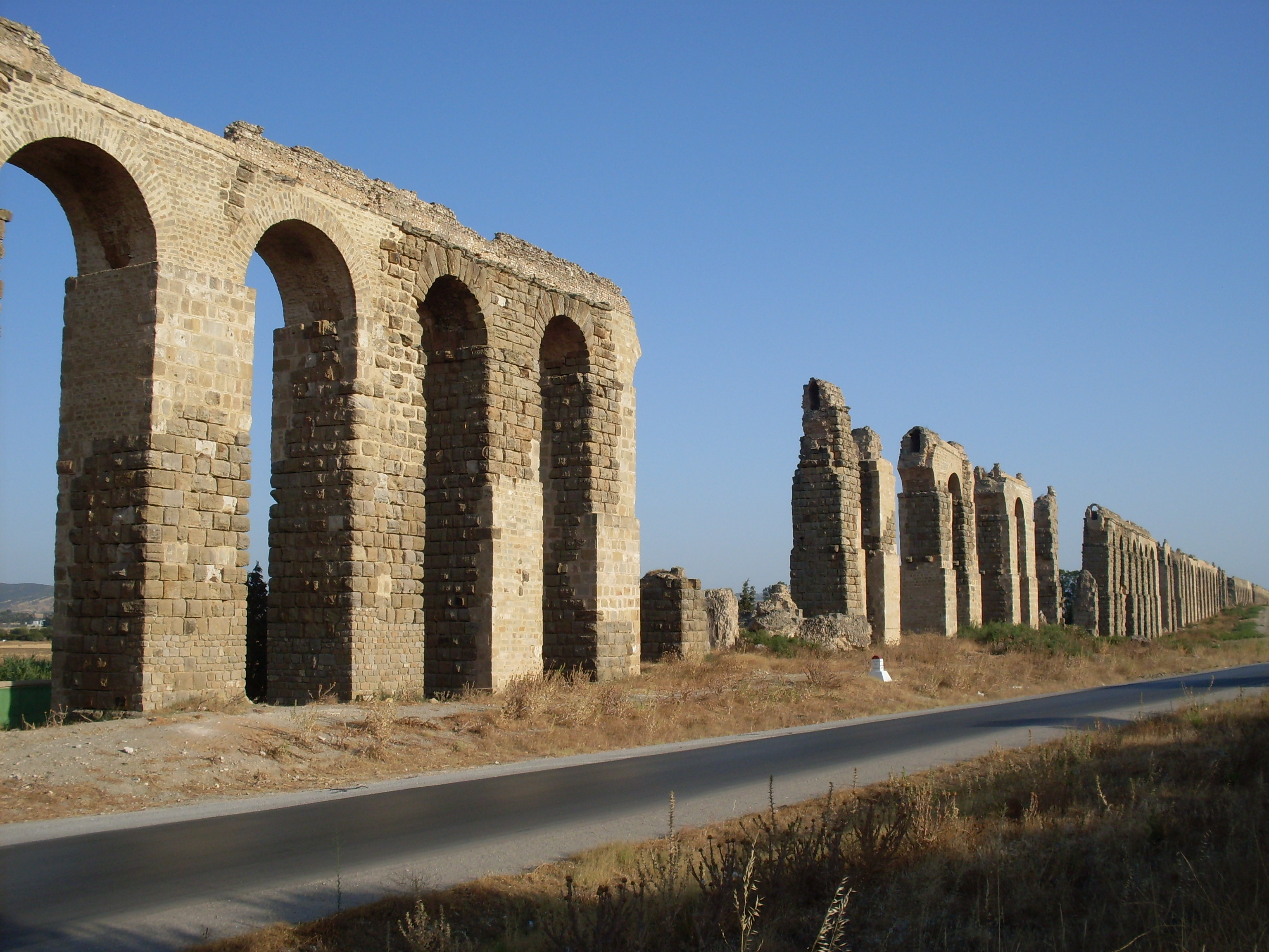 Aqueduc de Zaghouane après restauration